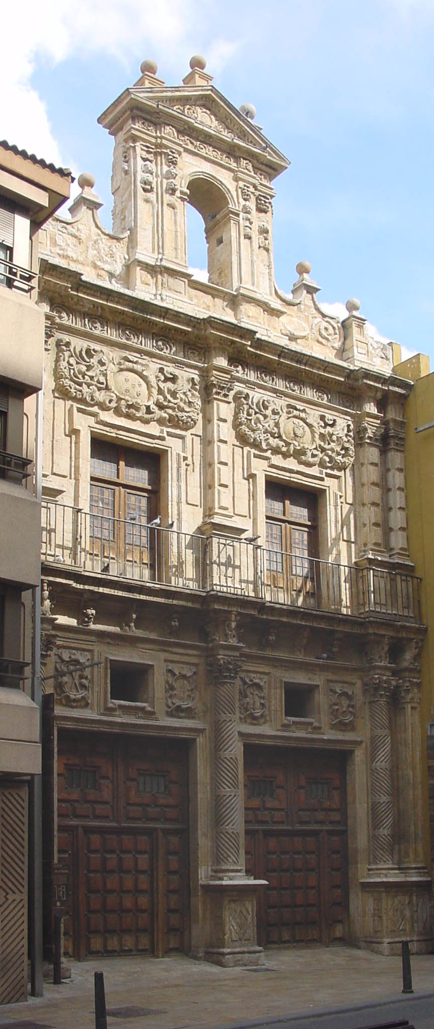 Portada de la iglesia de la Pasión en Valladolid, España.